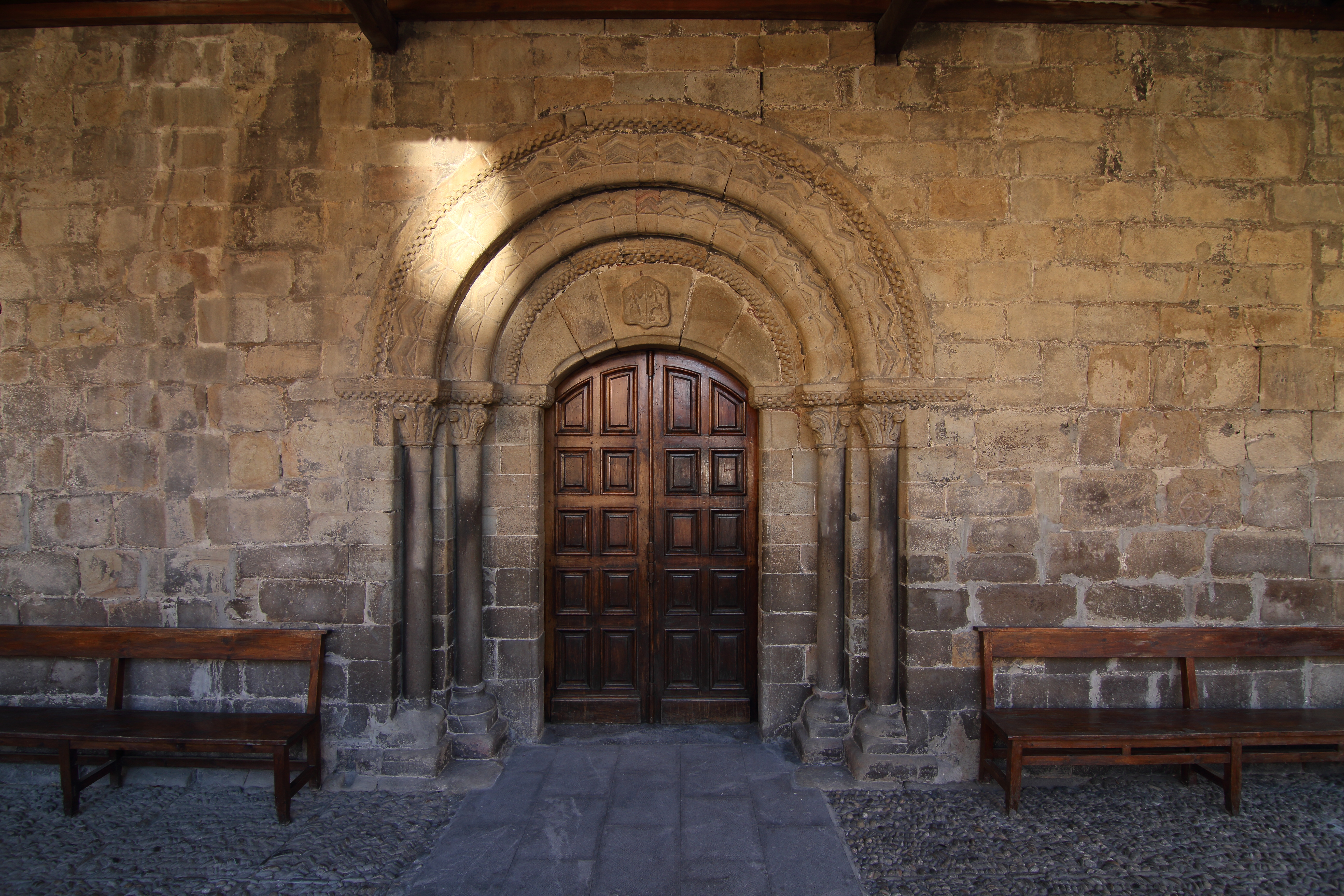 Iglesia de San Nicolás (Villoria), portada románica central.